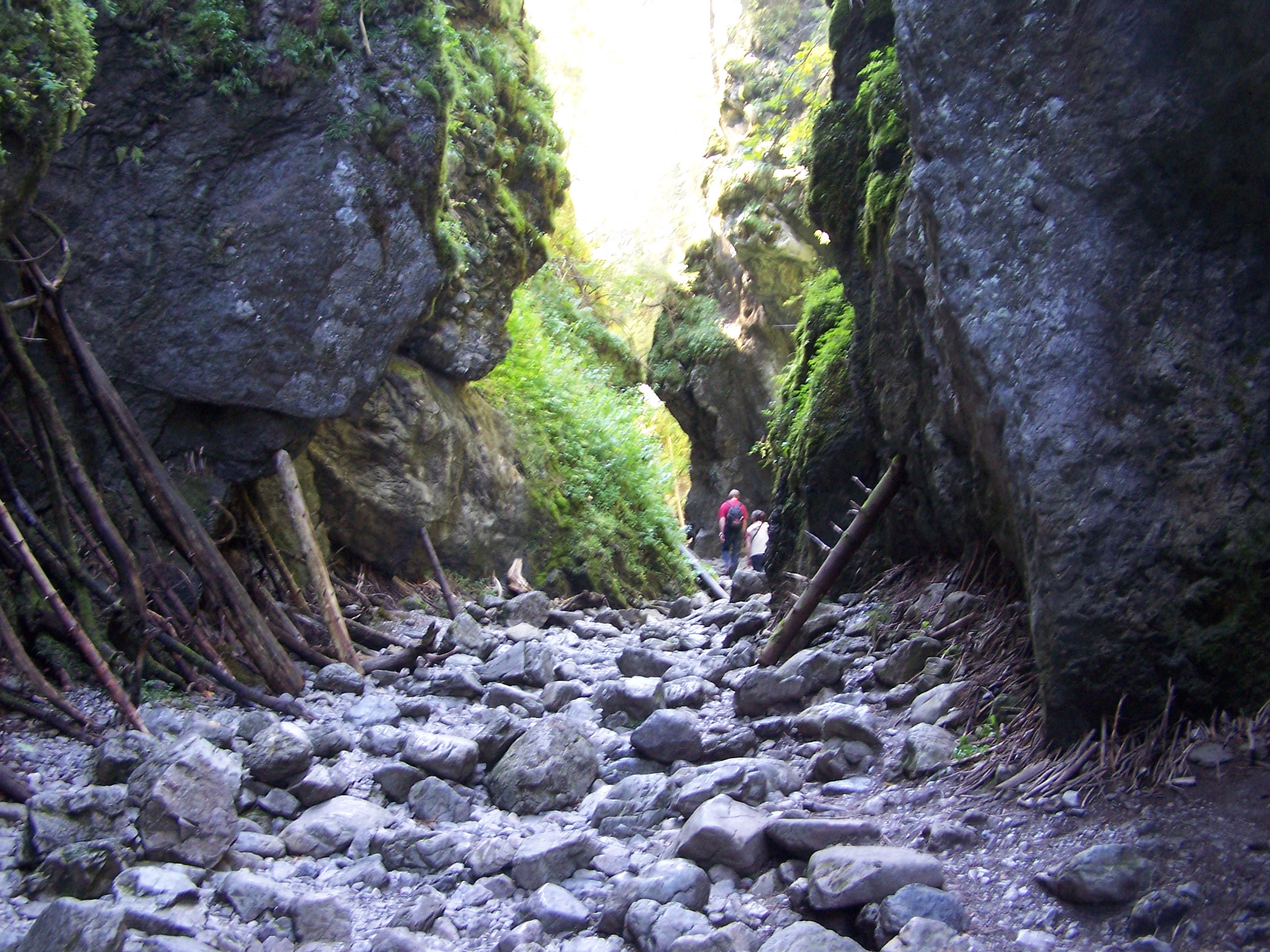 Wąwóz Kraków (Tatra Mountains, Dolina Kościeliska)